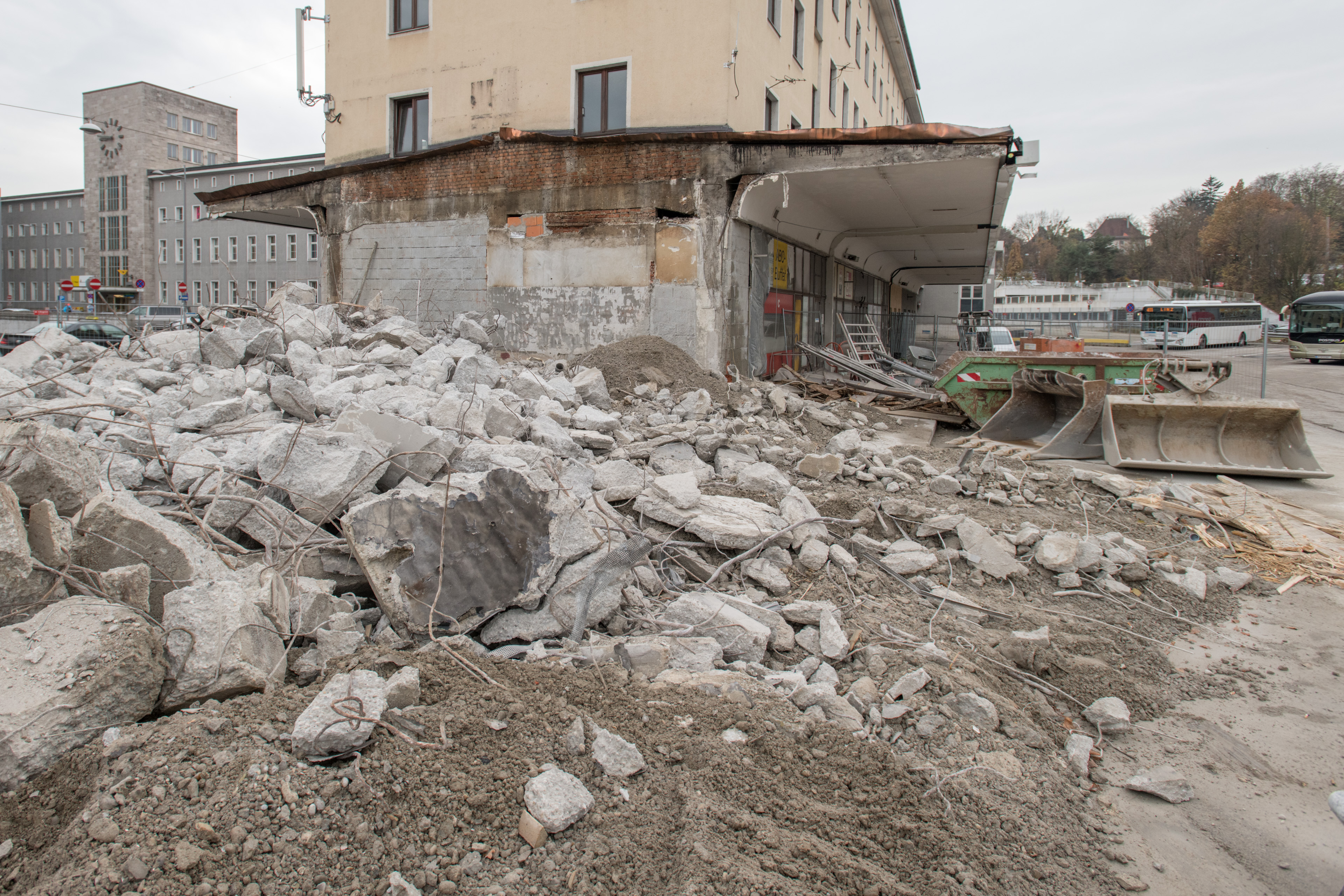 Abbruch des ABC-Buffets am Bahnhofplatz in Linz (ehem. Busbahnhof)